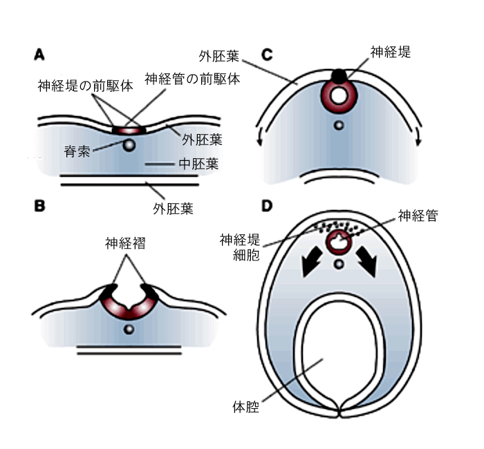 ヒトの胚における神経管の形成